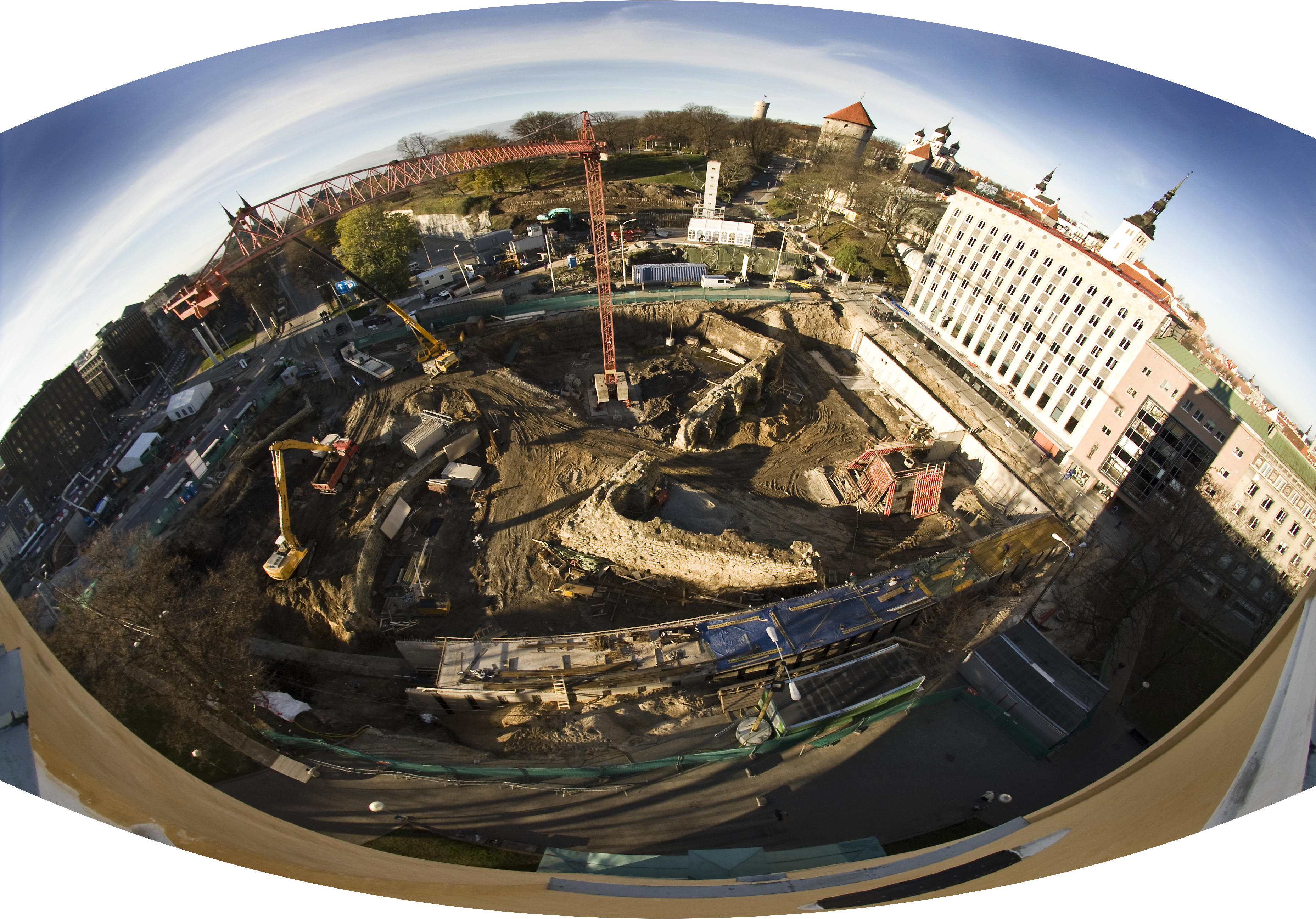 Harju maakond, Tallinna linn, Kesklinna linnaosa Harjumägi, Vabaduse väljak